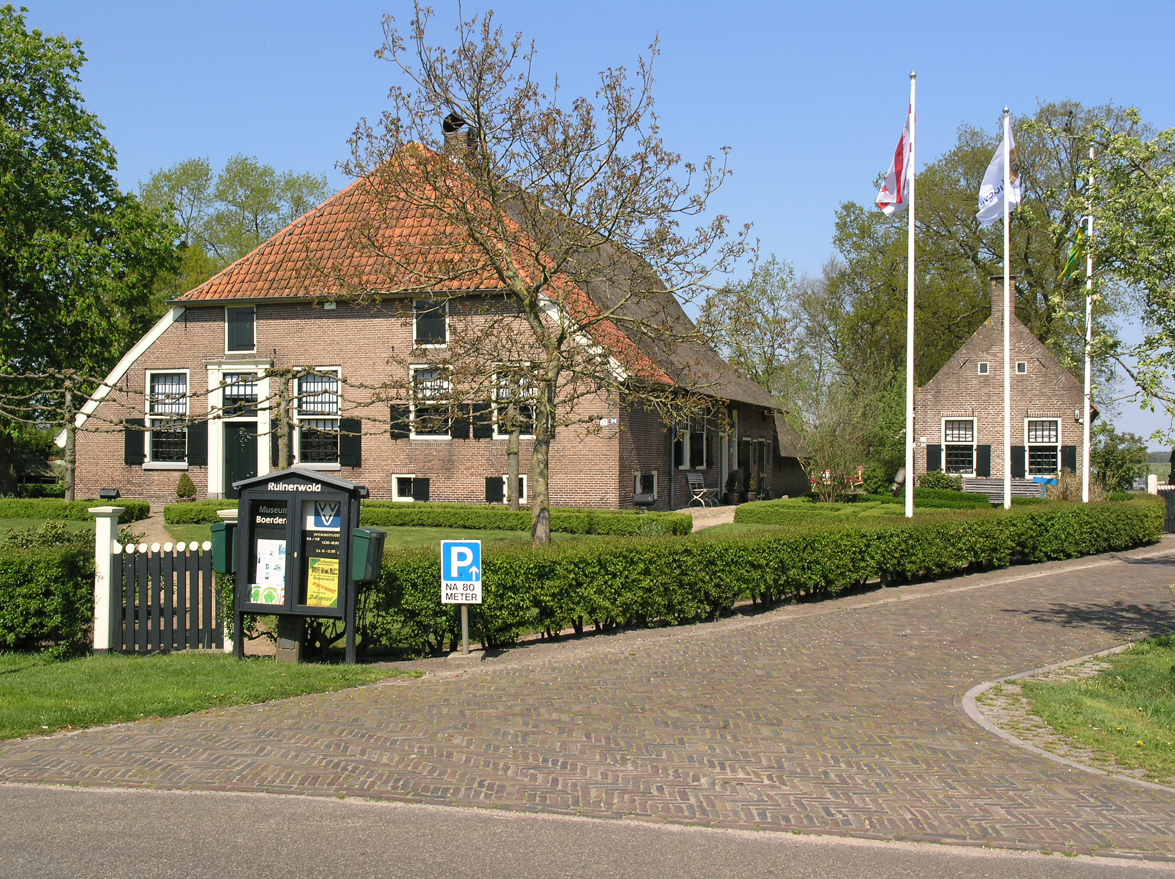 Ruinerwold Museum Boerderij